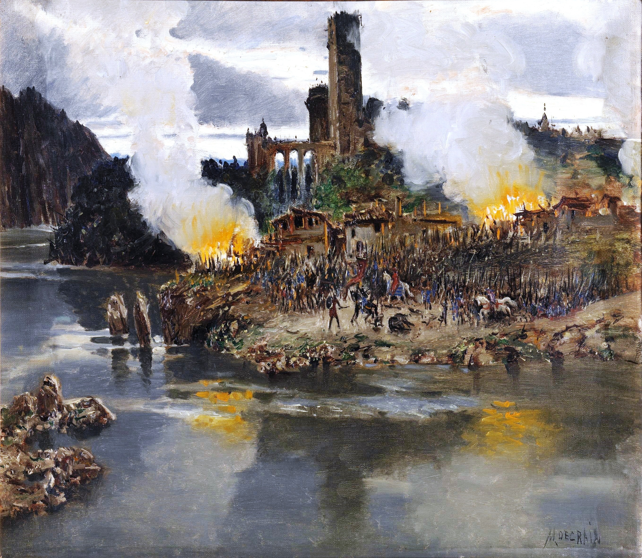 La obra representa una batalla terrestre.